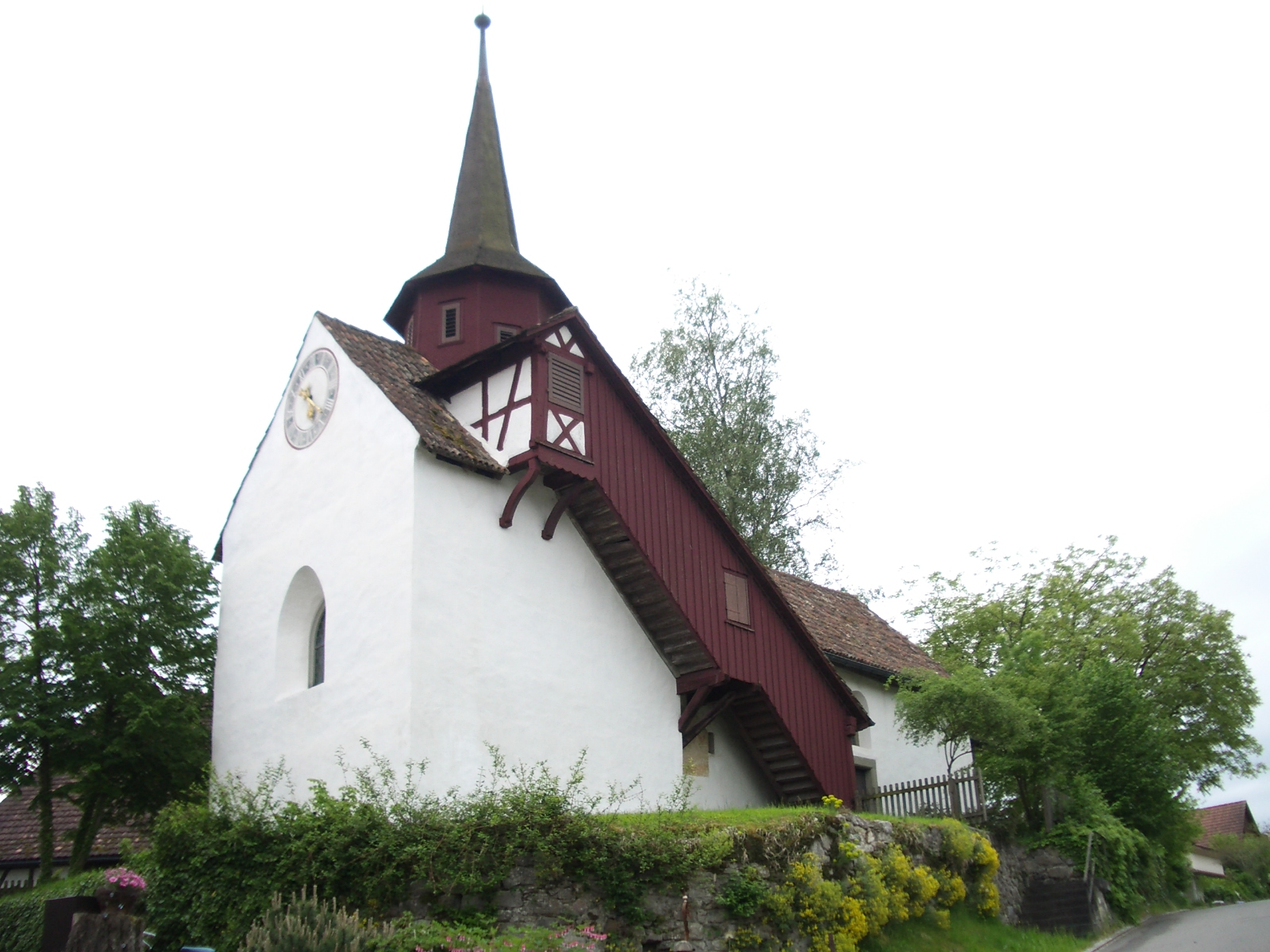 Waltalingen ZH, Switzerland